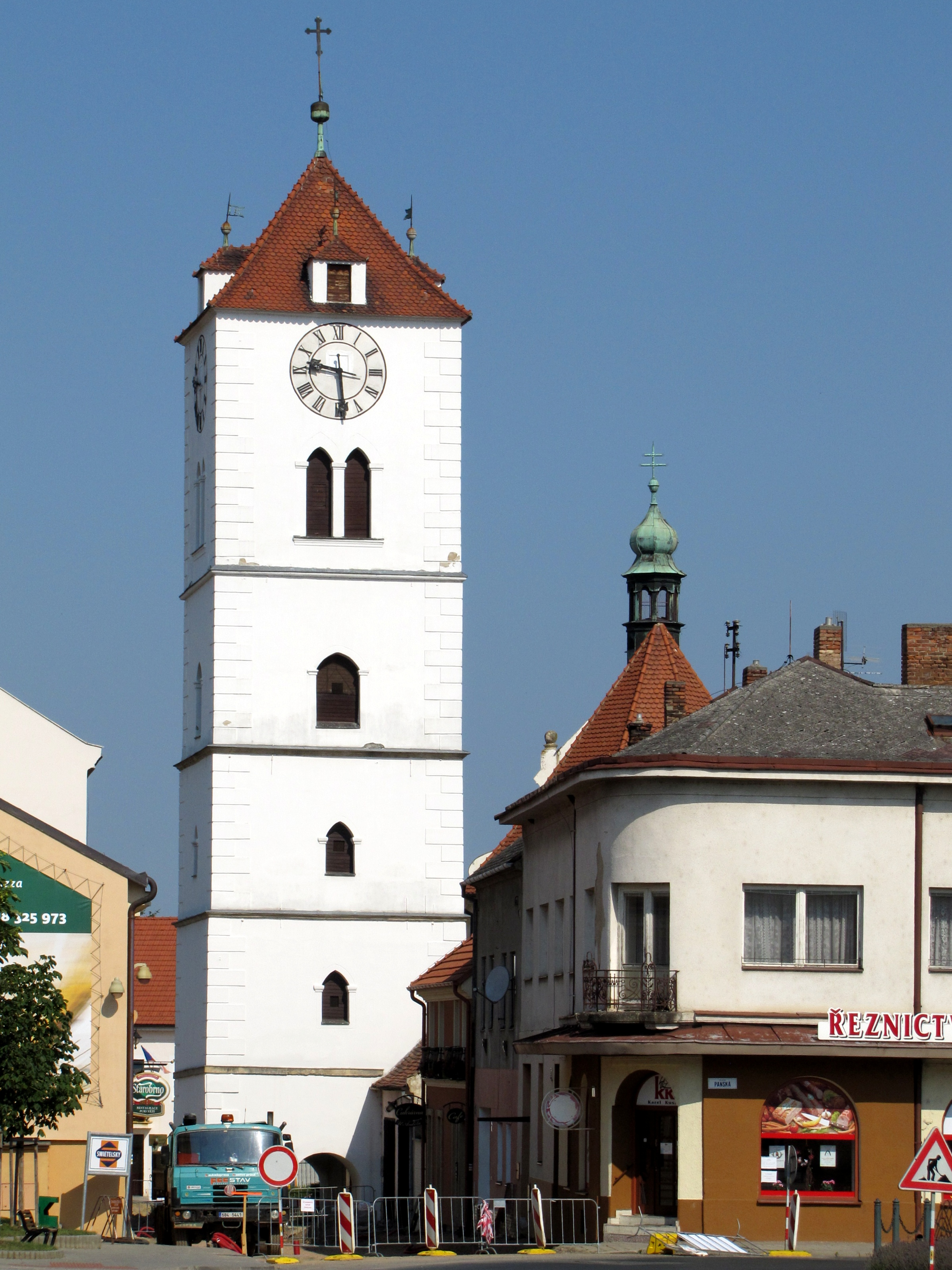 Bílá věž u kostela sv. Martina ve Strážnici, pravděpodobně z počátku 17. století. Pro nestabilní podloží se věž mírně naklání.